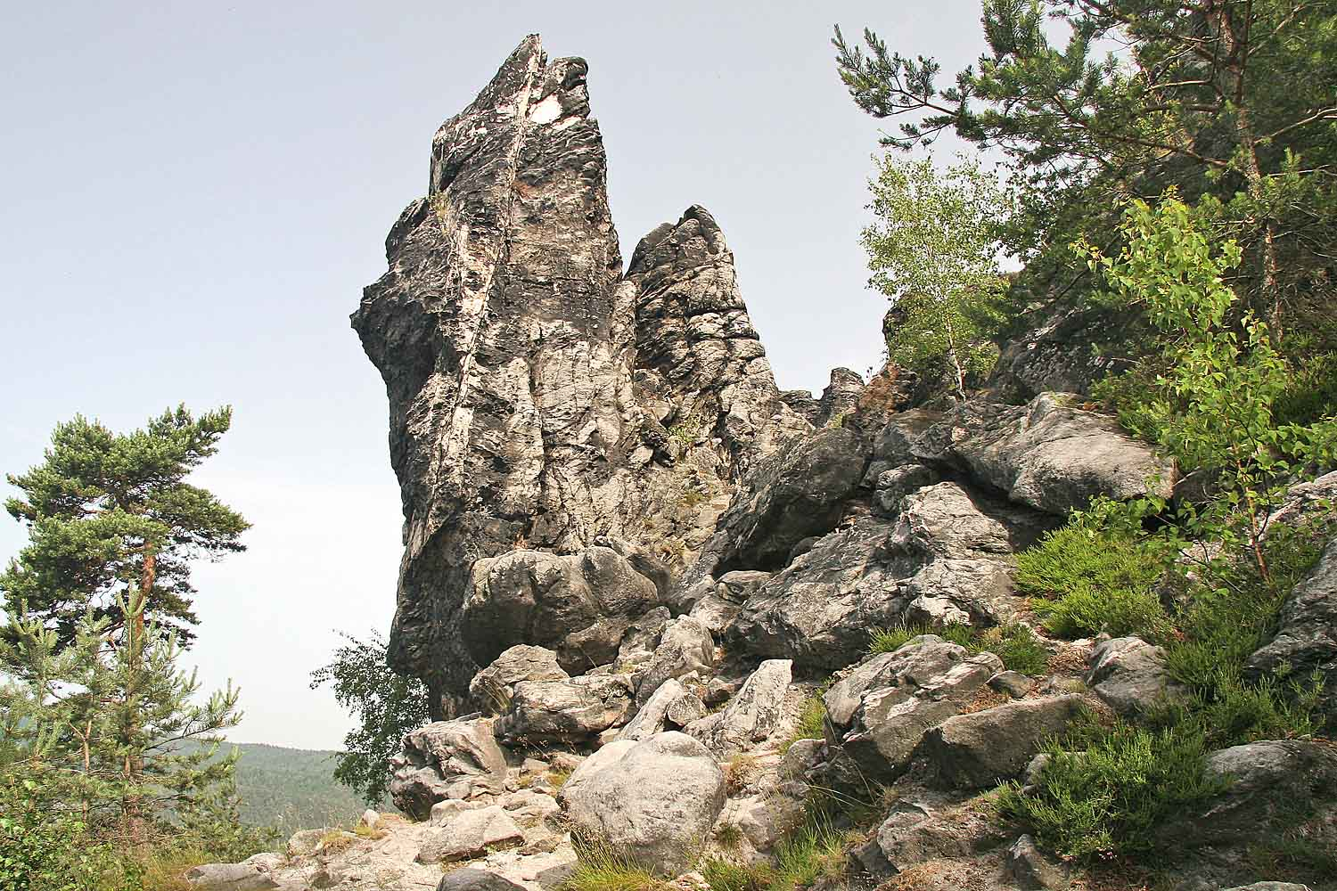 Skály na úbočí Scharfensteinu